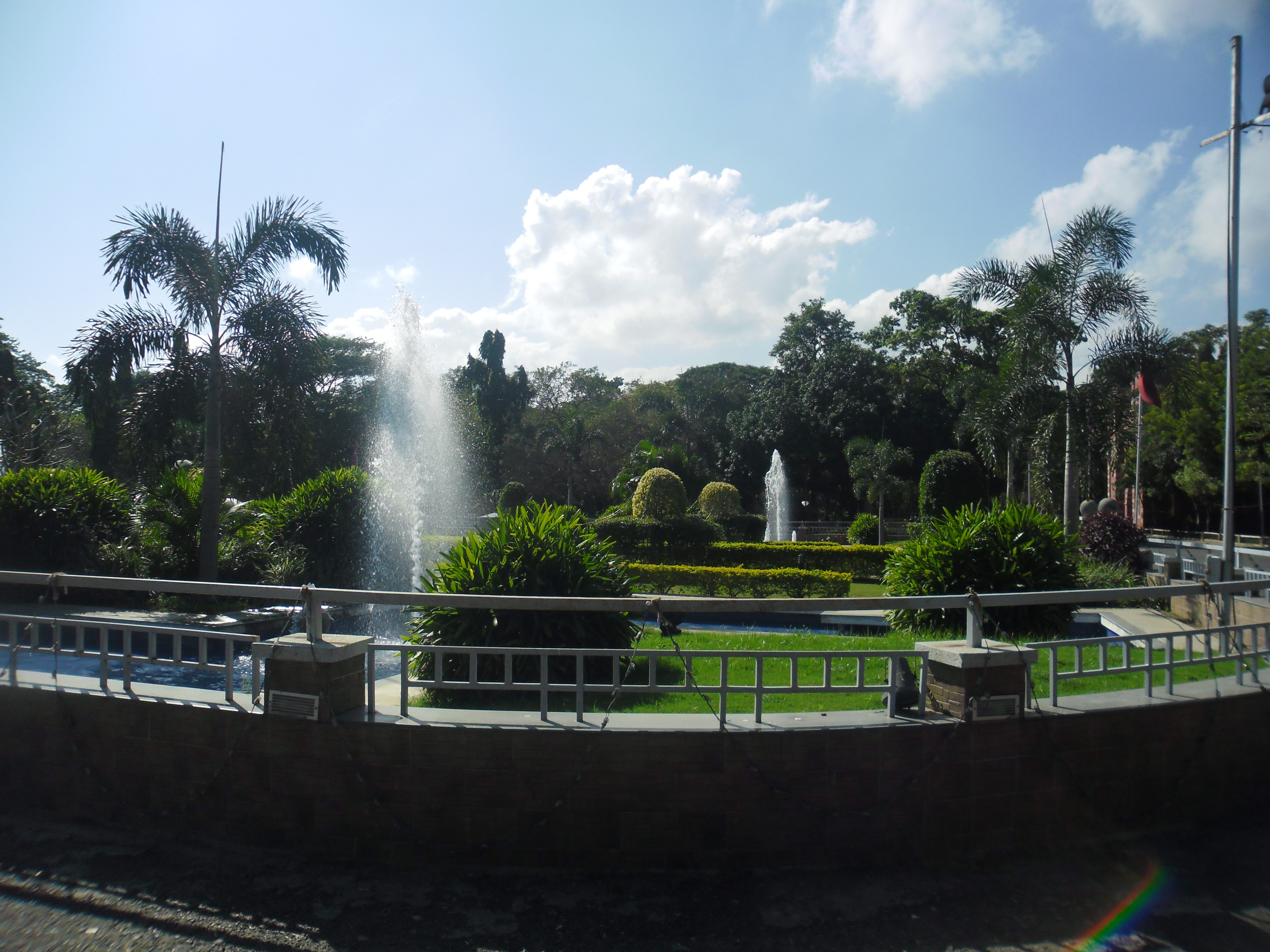 அண்ணா பூங்கா, அண்ணா பல்கலைக்கழகம்